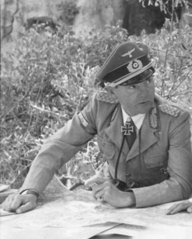 Title: Italien, Offiziere bei Lagebesprechung Extra information: Italien, Raum Rimini-Ancona.- Generalmajor Ernst-Günther Baade (links) mit Ritterkreuz des Eisernen Kreuzes (mit Eichenlaub und Schwertern) und "Sonderabzeichen für das Niederkämpfen von Panzerkampfwagen durch Einzelkämpfer" (Panzervernichtungsabzeichen), und Hauptmann People in the image: Ernst-Günther Baade: Generalleutnant, Ritterkreuz (RK), Heer, Deutschland Factual corrections and alternative descriptions are encouraged separately from the original description. Additionally errors can be reported at this page to inform the Bundesarchiv. Original historic description